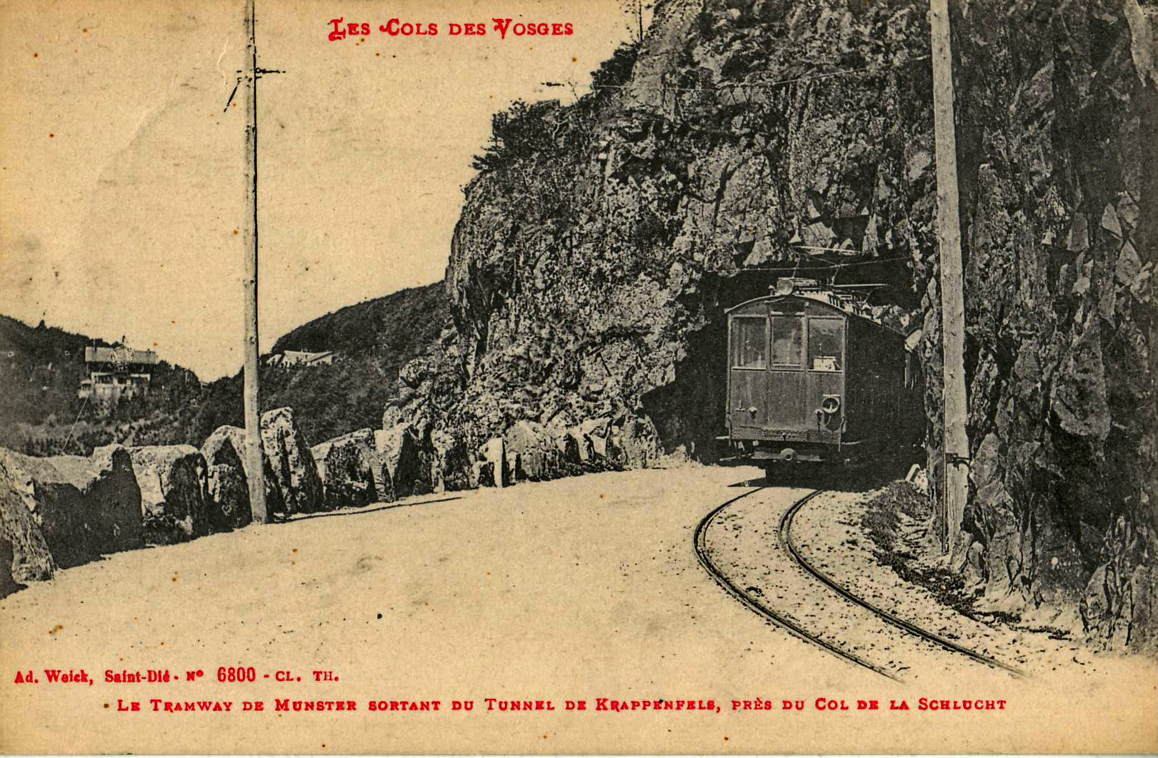 Carte postale ancienne éditée par Ad. Weick à Saint-Dié, collection Les Cols des Vosges, n°6800 : Le Tramway de Munster sortant du tunnel de Krappenfels, près du Col de la Schlucht